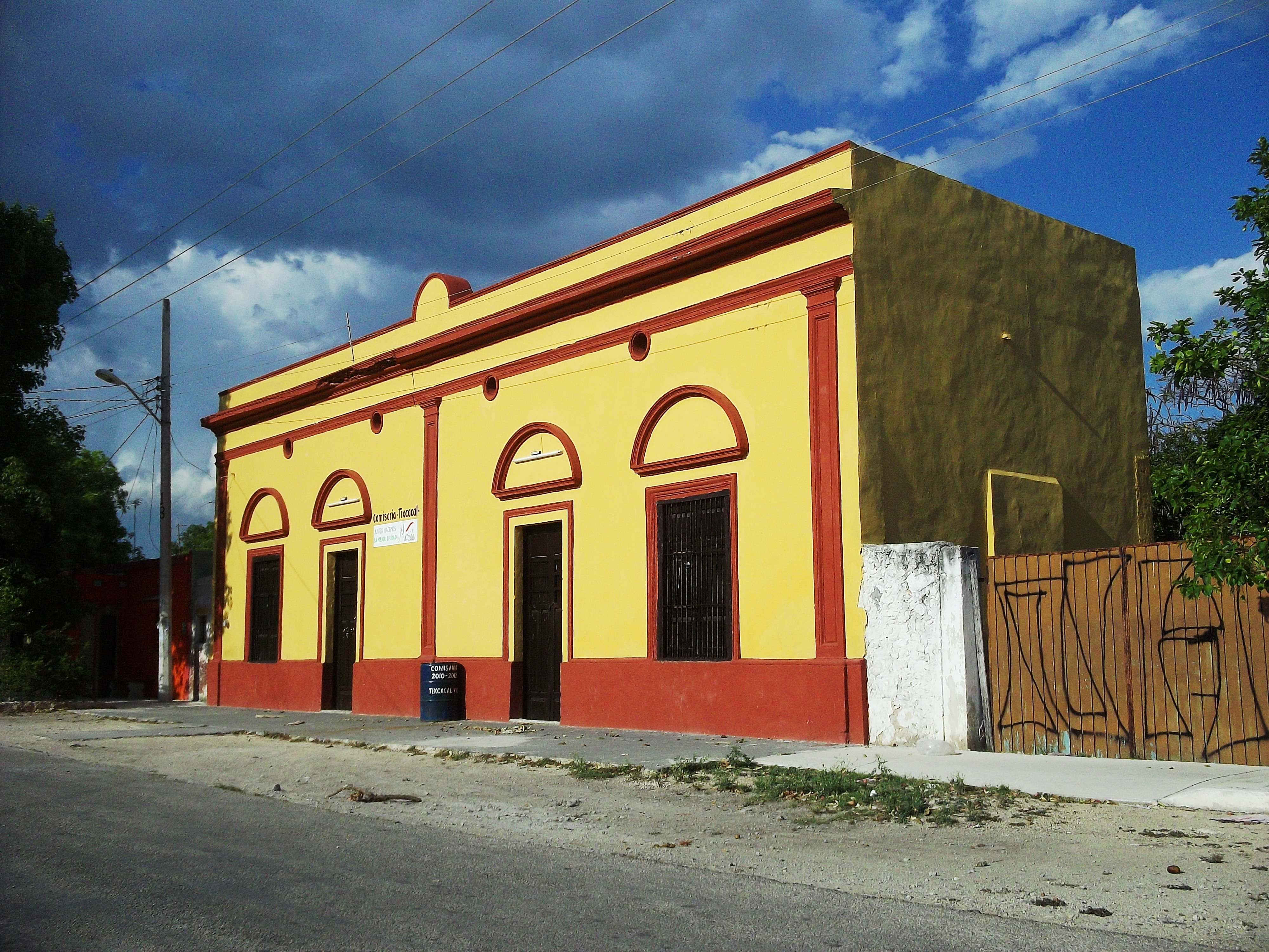 Casa comisarial de Tixcacal (Mérida), Yucatán.